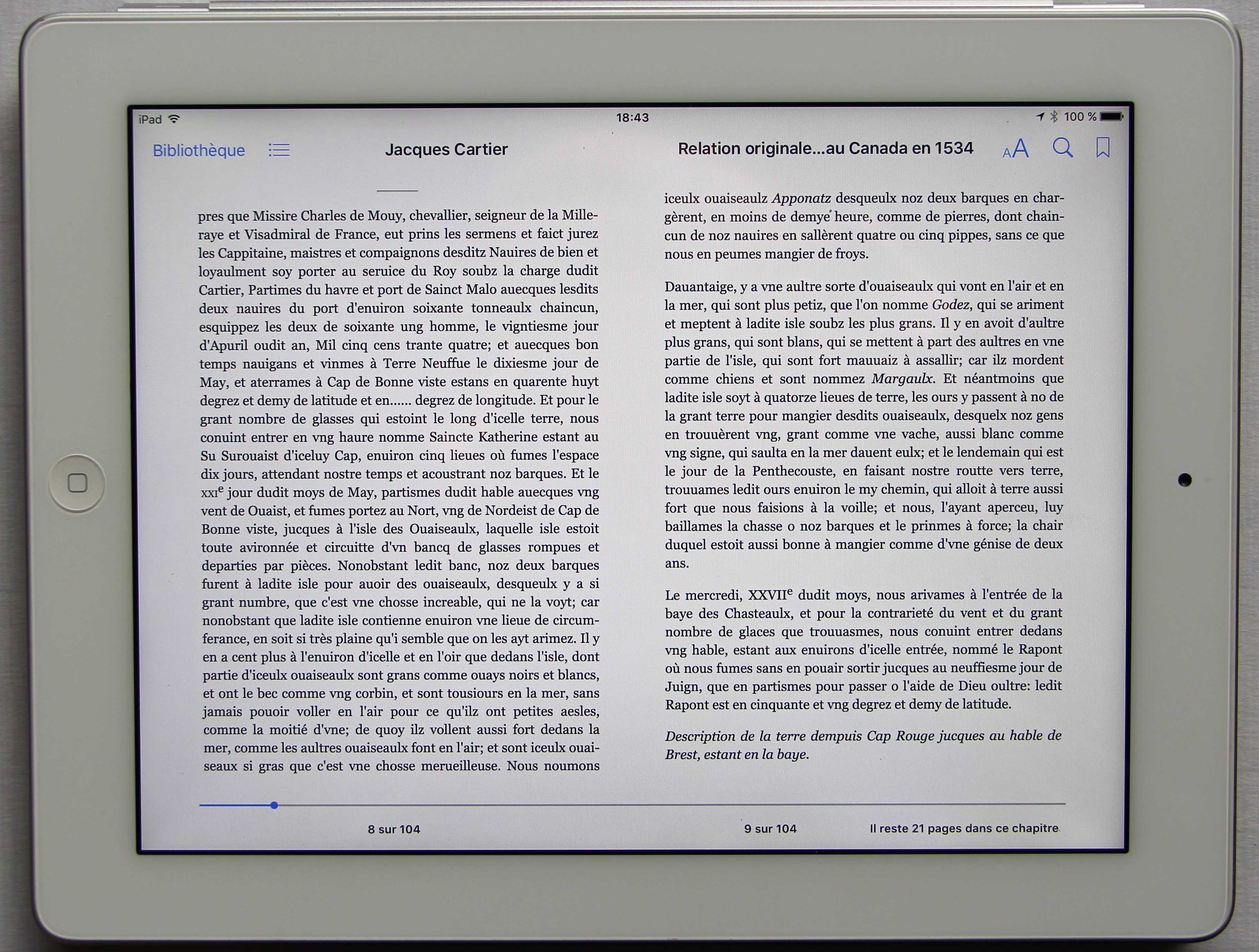 Affichage d'une page du livre de François Bon, Après le livre (2011)